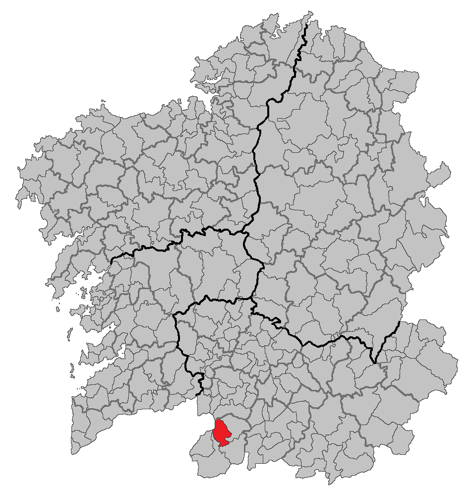 Mapa coa localización do concello de Lobeira.